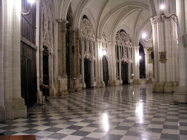 Girola de la Catedral de Toledo, España.